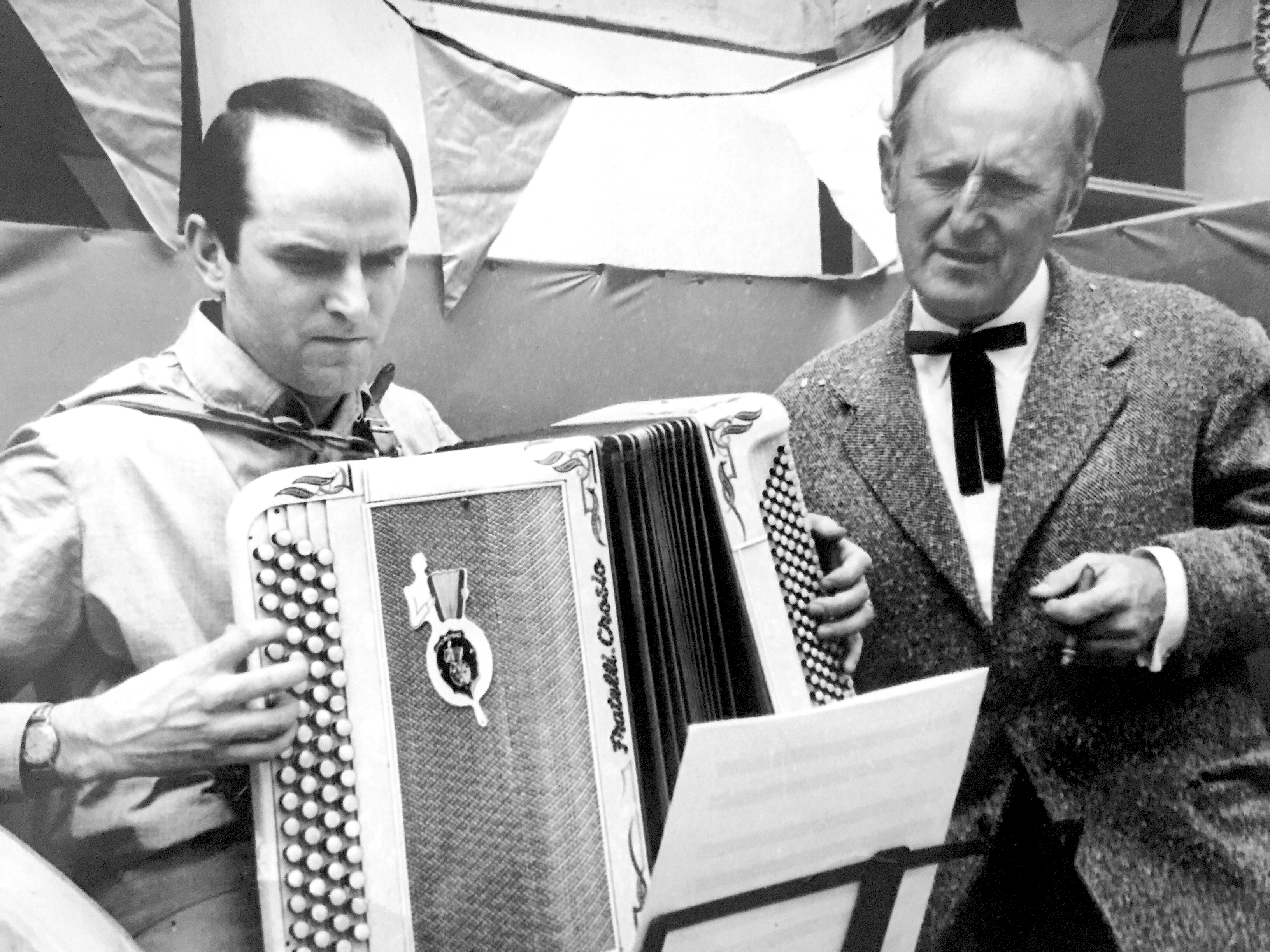 Bourvil et Roland Zaninetti en 1965 sur le tournage du film Les Grandes Gueules de Robert Enrico